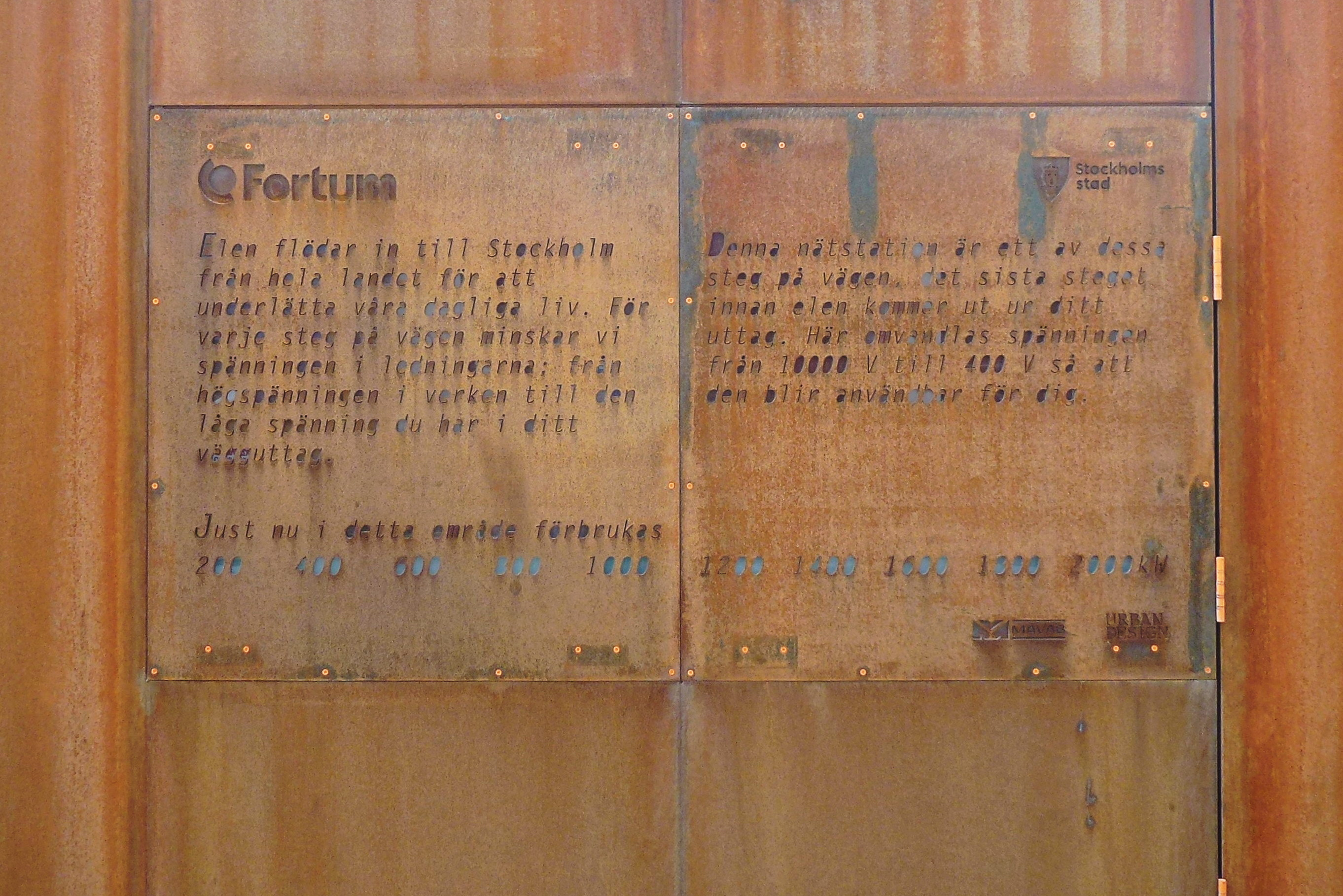 Fortums teknikhus, Storängstorget, nominerades till "Årets Stockholmsbyggnad 2015"